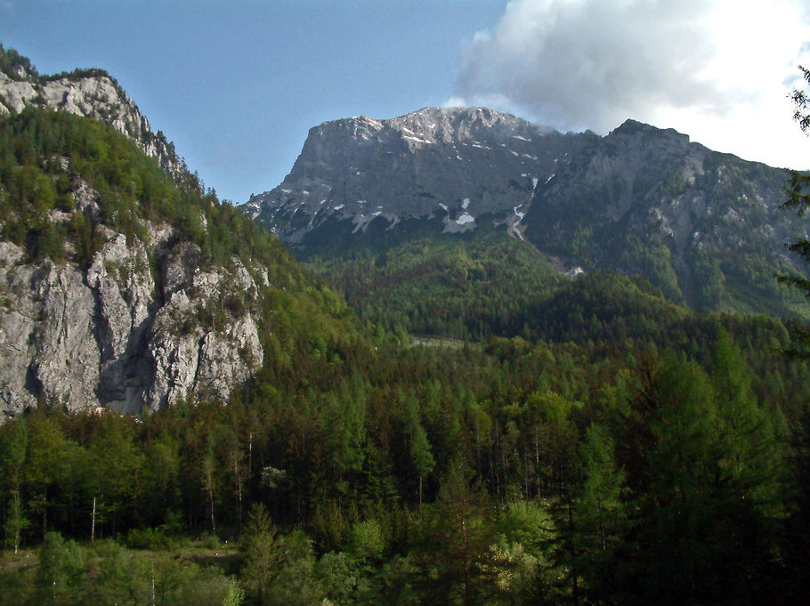 Park Gesäuse a Gr. Buchstein